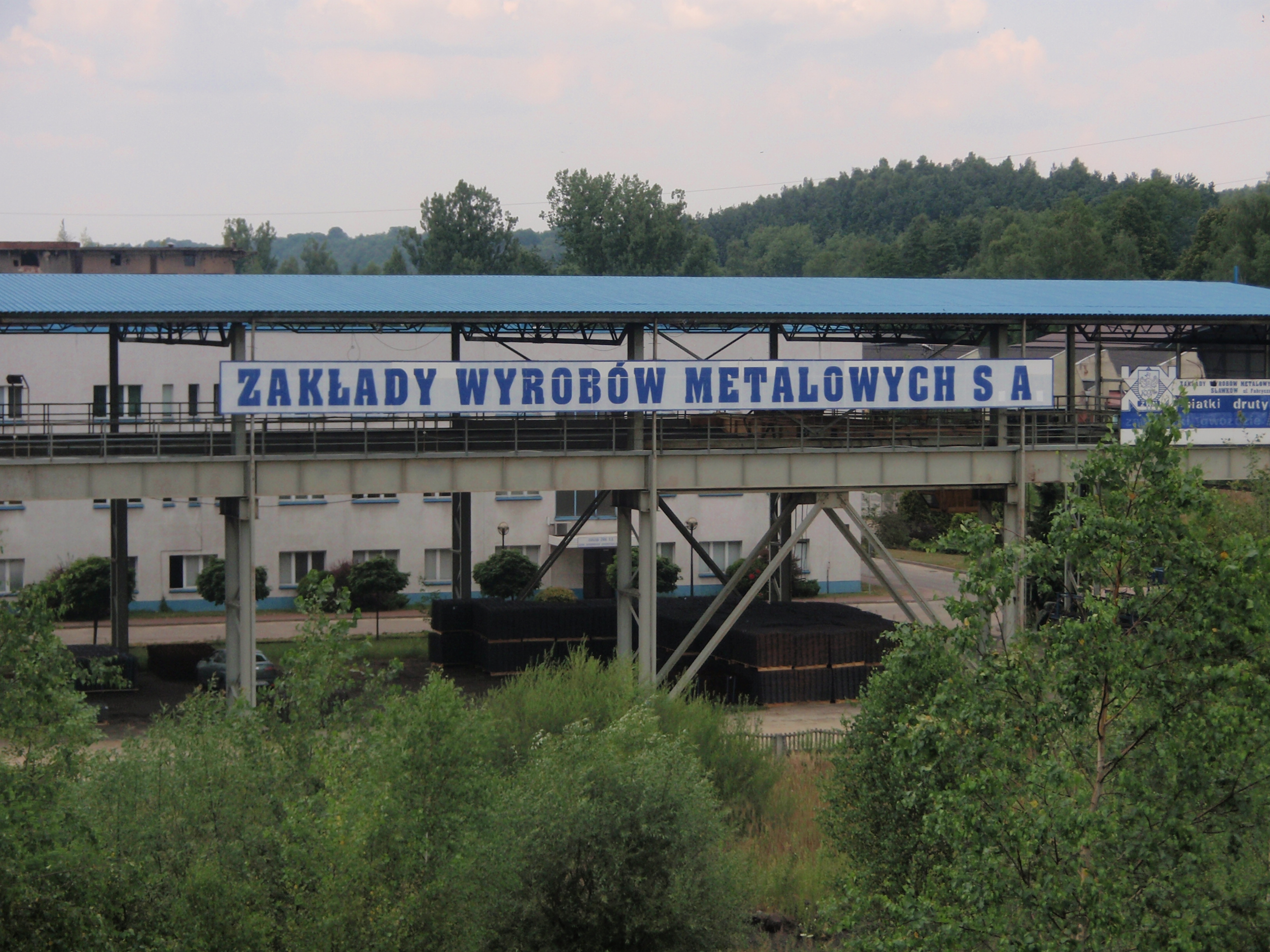 Zakłady Wyrobów Metalowych w Sławkowie (woj. śląskie)